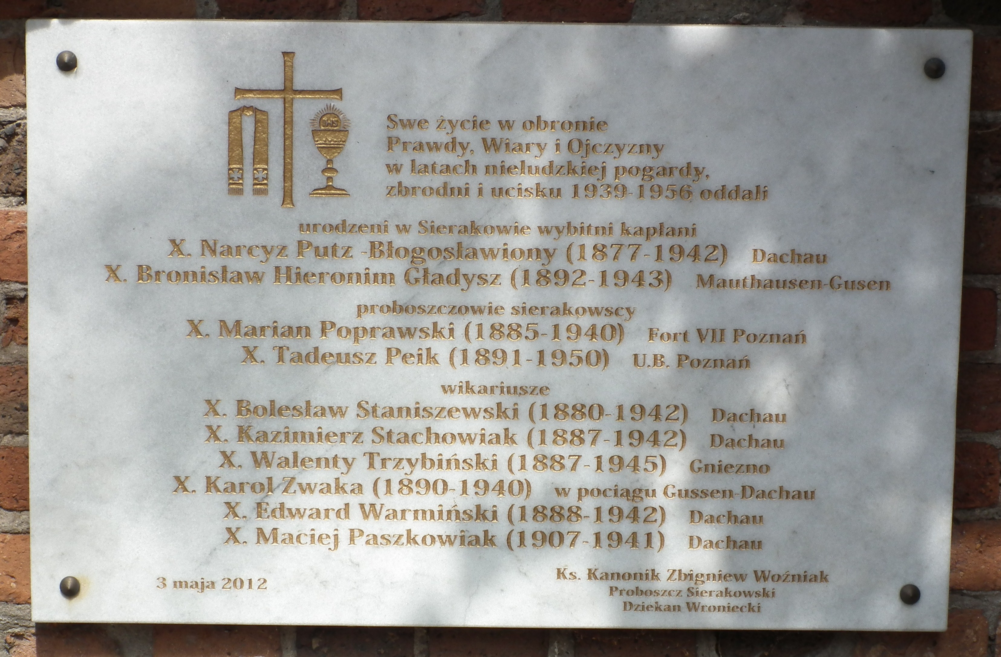 Tablica przy kościele bernardyńskim w Sierakowie.